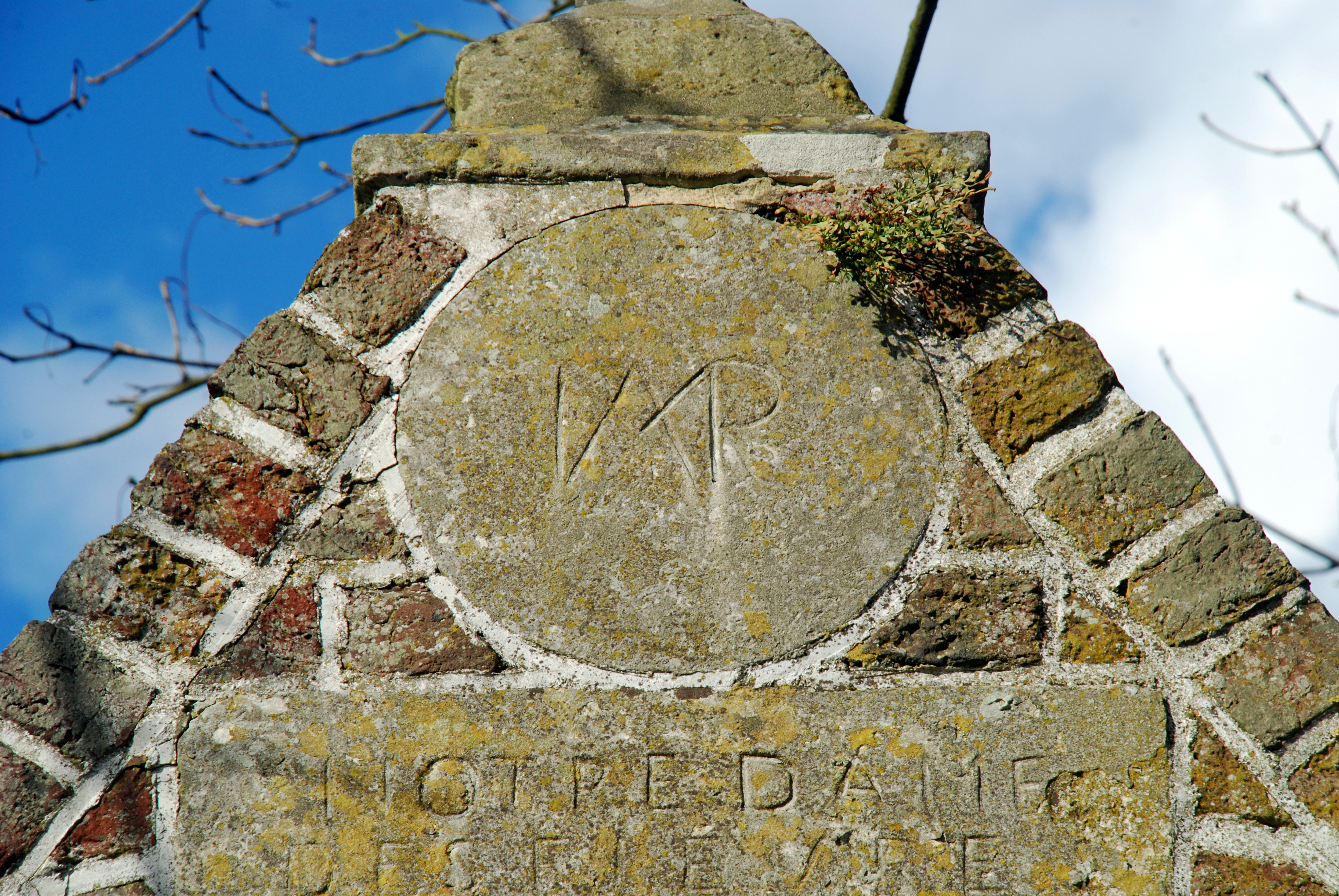 Belgique - Brabant wallon - Ottignies - Manoir de Franquenies